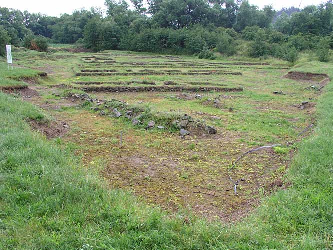 Půdorys zástavby zaniklé středověké vsi Mstěnice u Hrotovic v okrese Třebíč